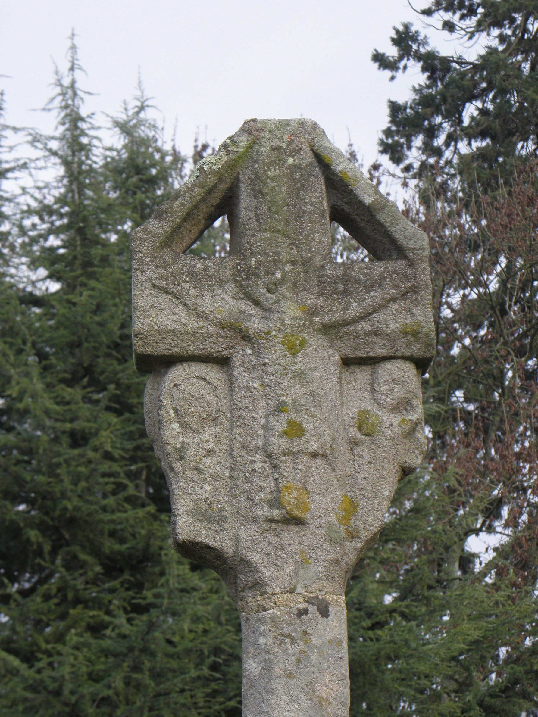 Croix du cimetière de Clayes (35). Christ en Croix entre deux personnages.